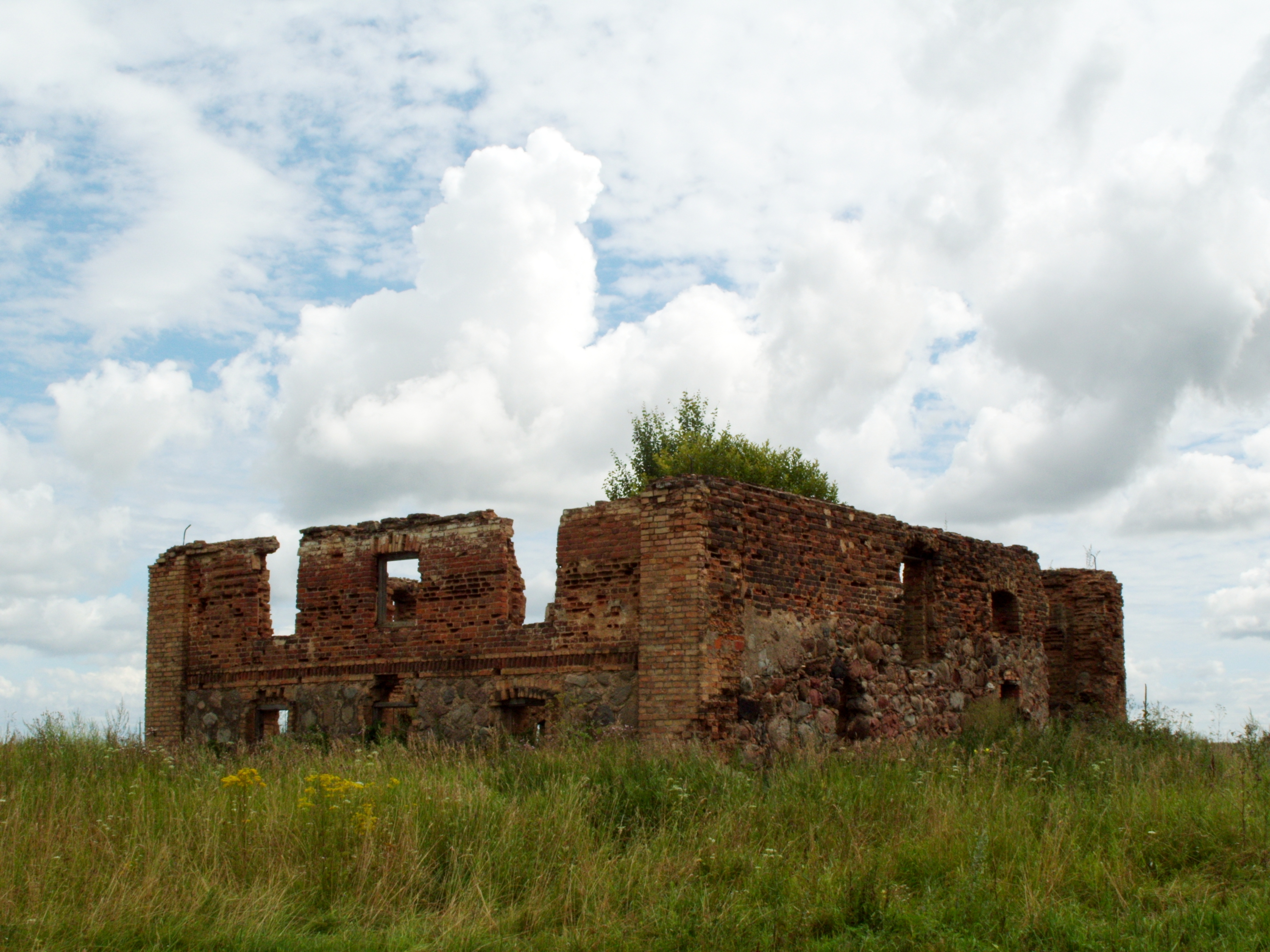 Беларуская (тарашкевіца): Вёска Сяліба, рэшткі вадзянога млына.